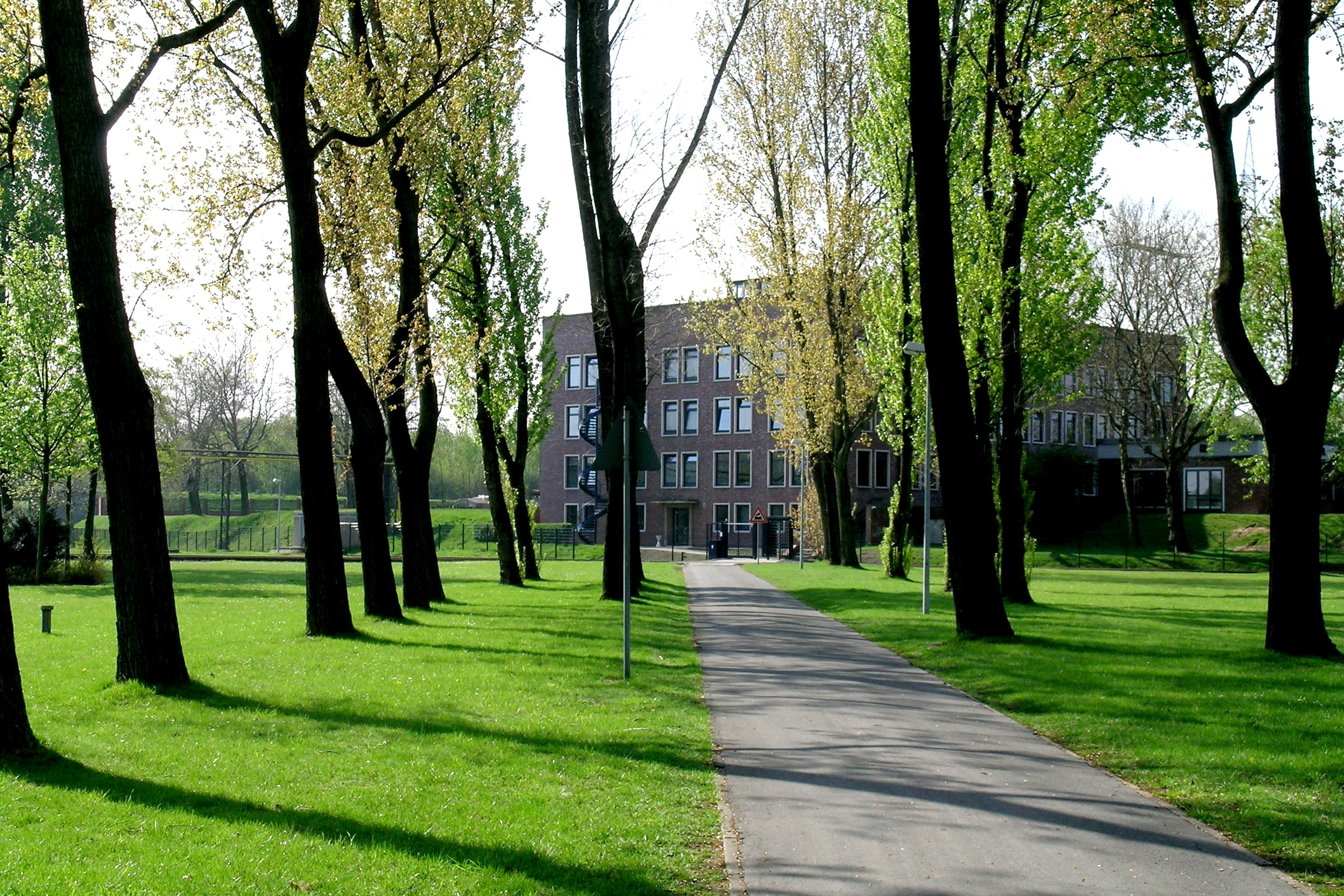 Remondis-Verwaltung